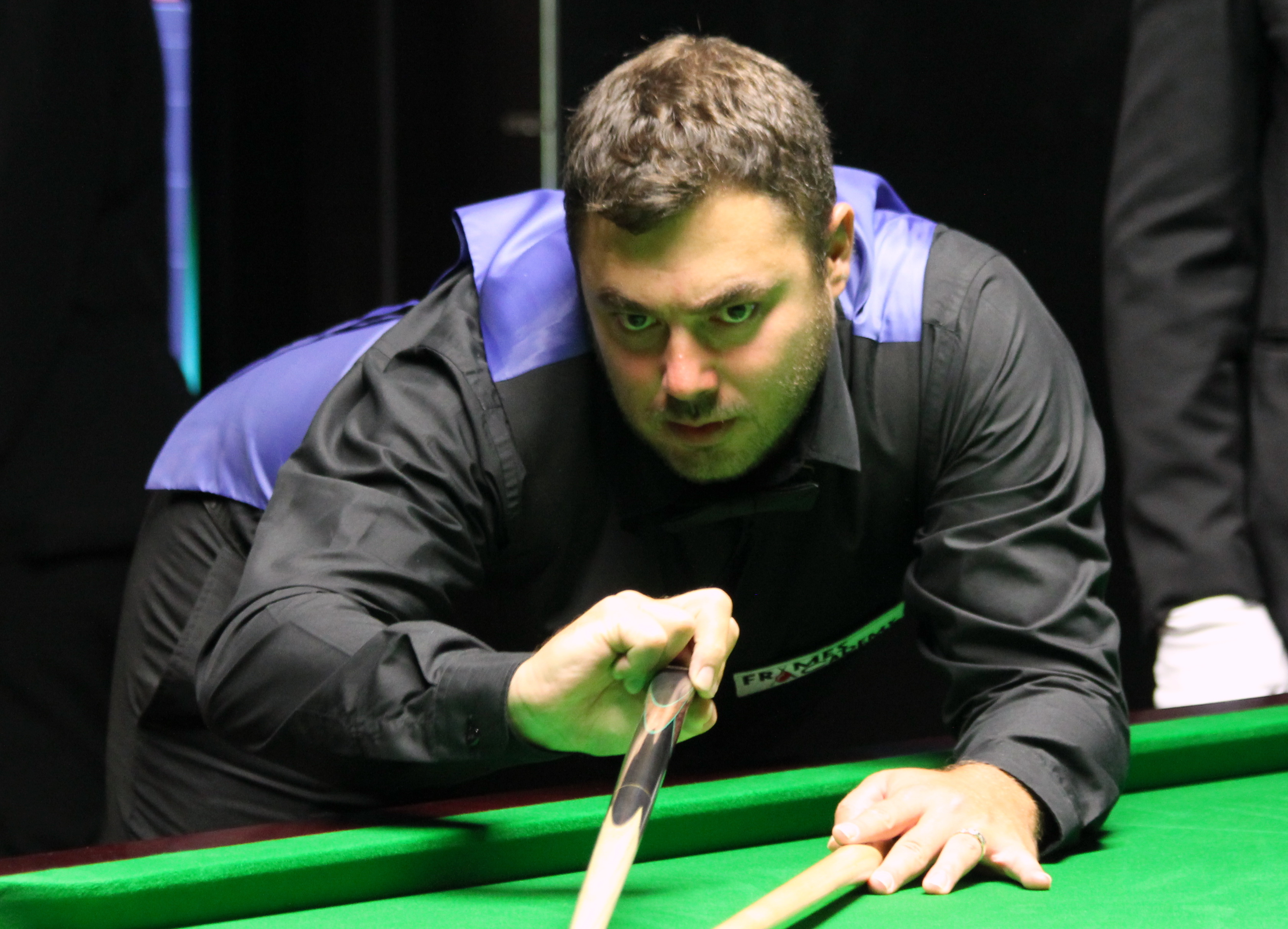 Kurt Maflin beim Paul Hunter Classic 2016